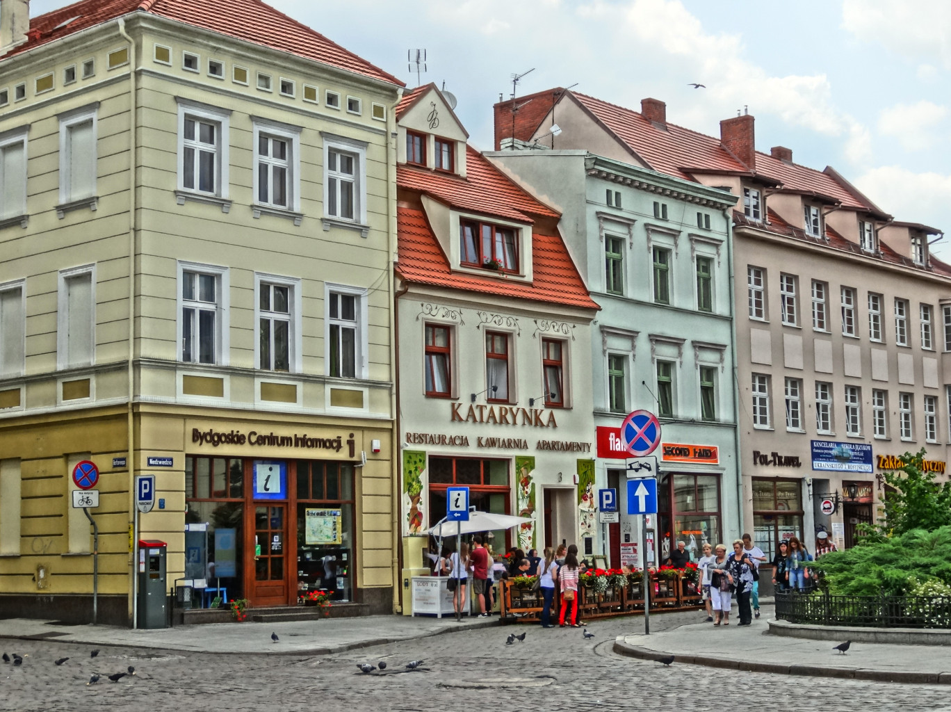 Ulica Niedźwiedzia w Bydgoszczy (Boczna od Starego Rynku)